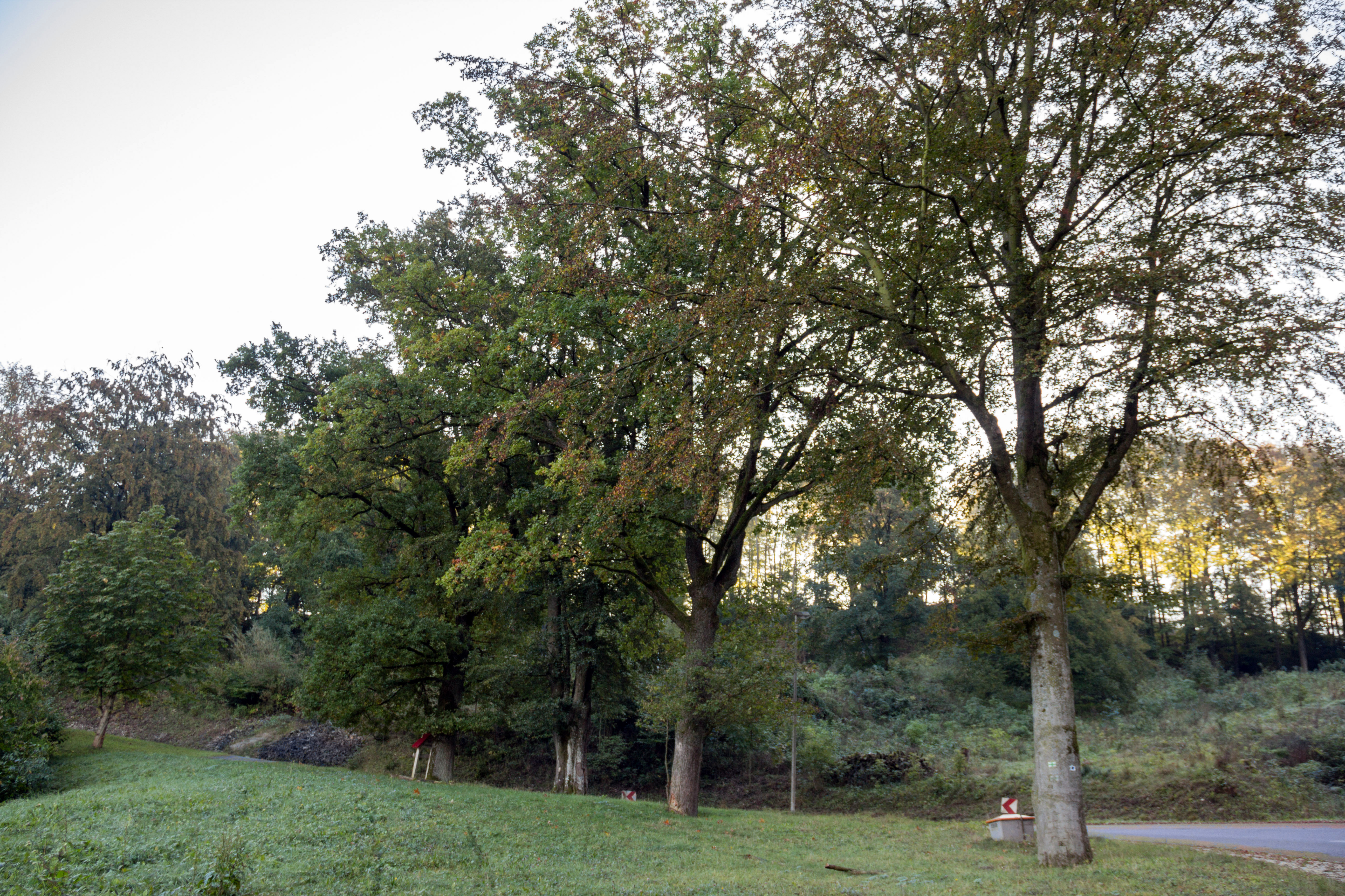 Die Breitenbrunner Buchenreihe, Naturdenkmal, Landschaftsschutzgebiet Südlicher Jura mit Moritzberg und Umgebung